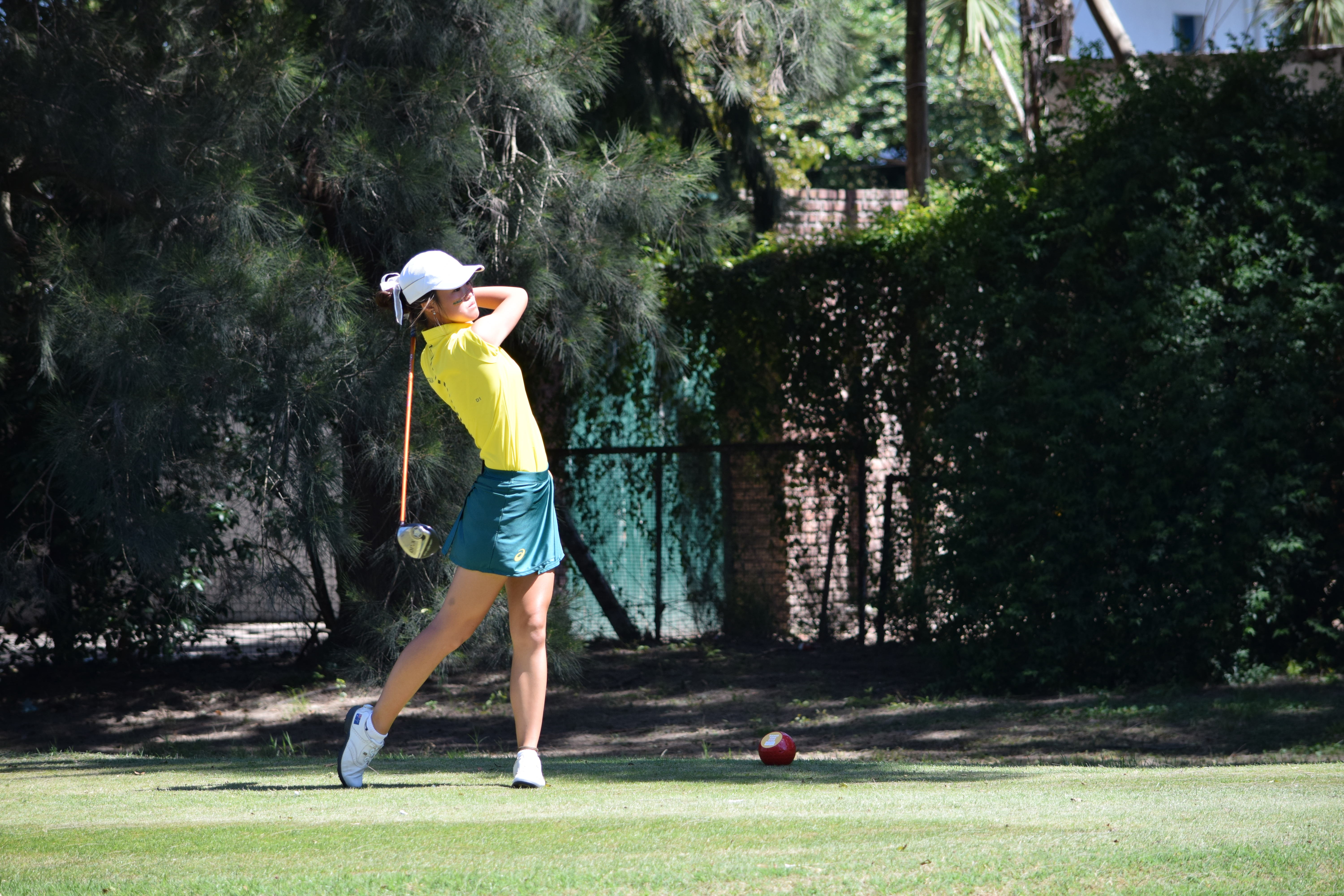 Tercera ronda de golf en equipos mixtos durante los Juegos Olímpicos de la Juventud 2018 en Buenos Aires. Grace Kim.